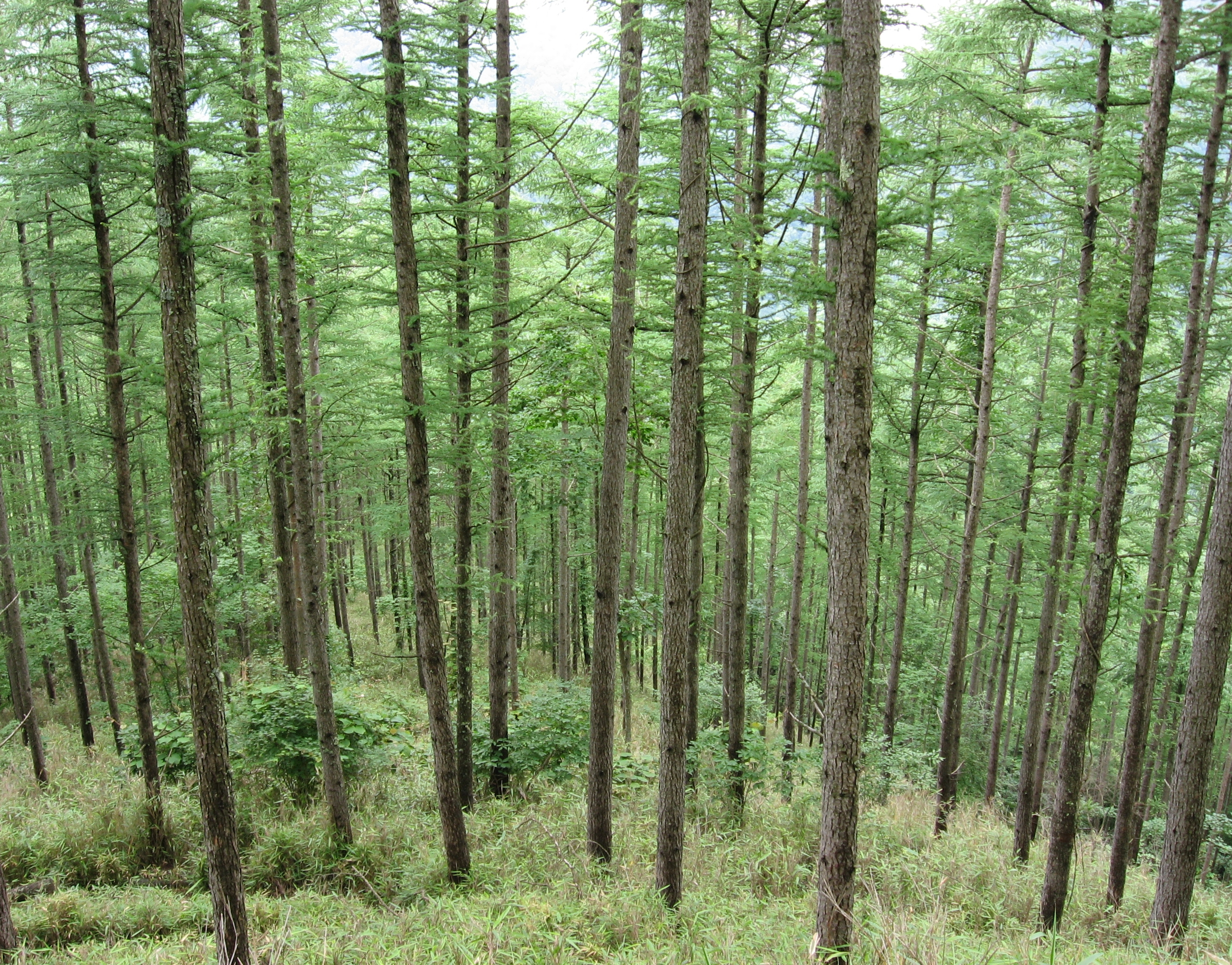 奥秩父、徳ちゃん新道のカラマツ林